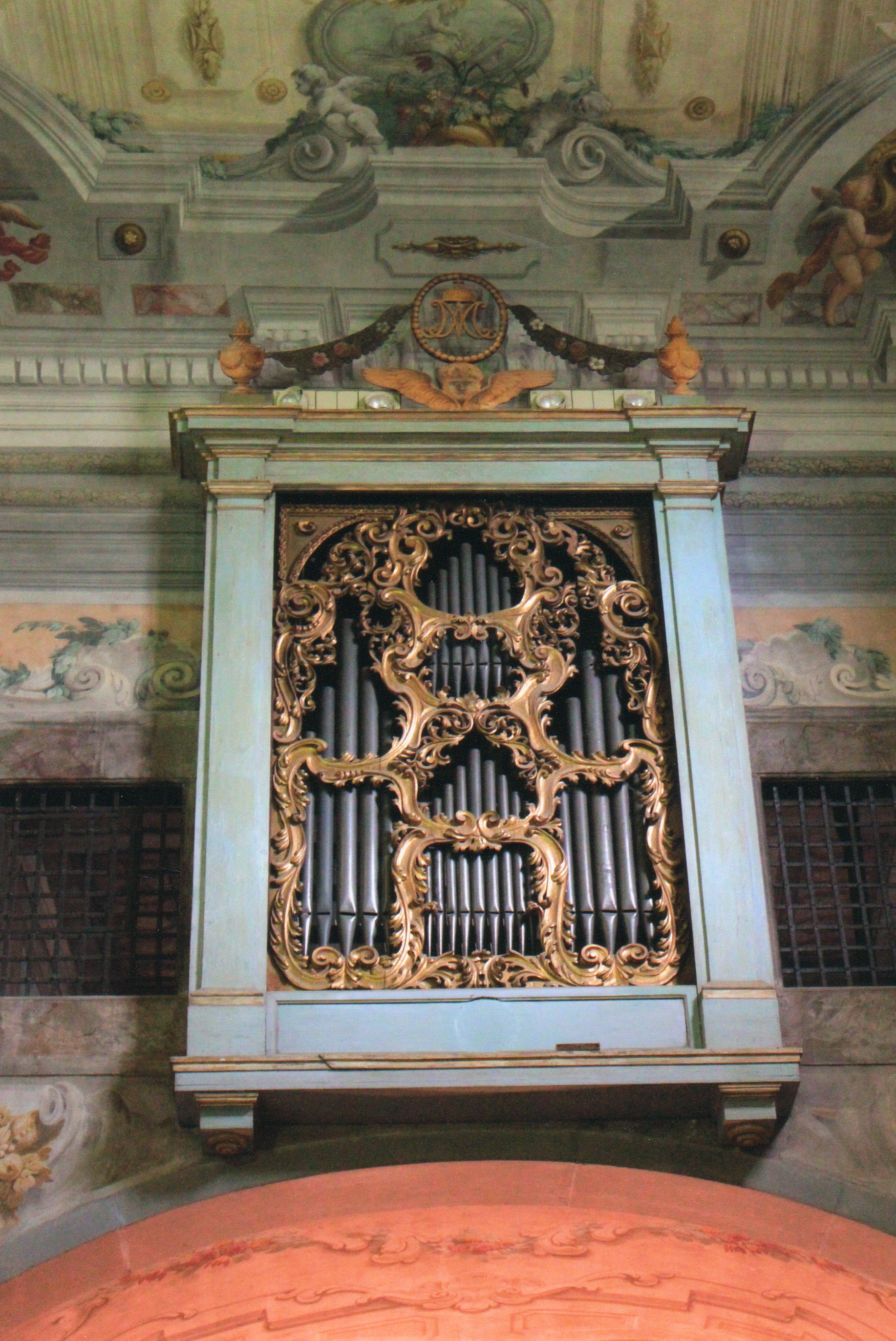 Organo monacale dell'educatorio di Fuligno a Firenze